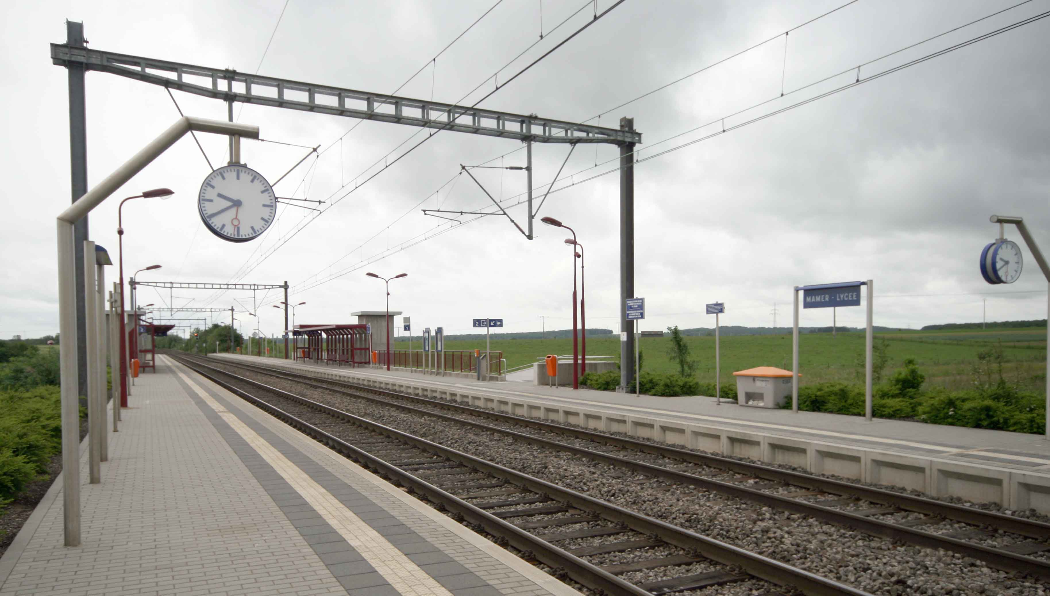 GAR MAM L.